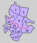 後の長崎県壱岐郡域の町村制時点の町村。